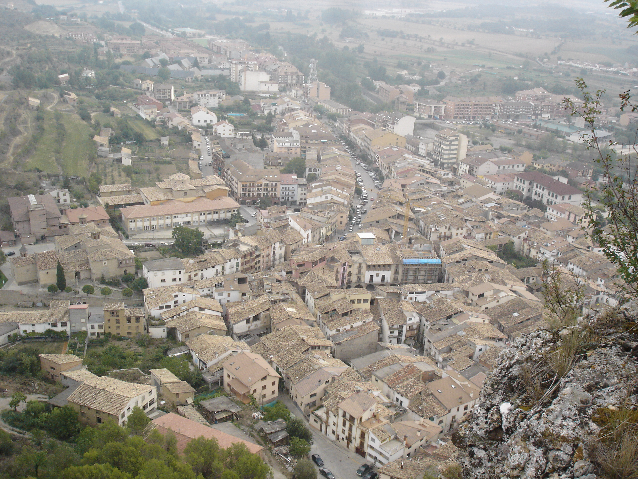 Vista general de Graus, provincia de Huesca